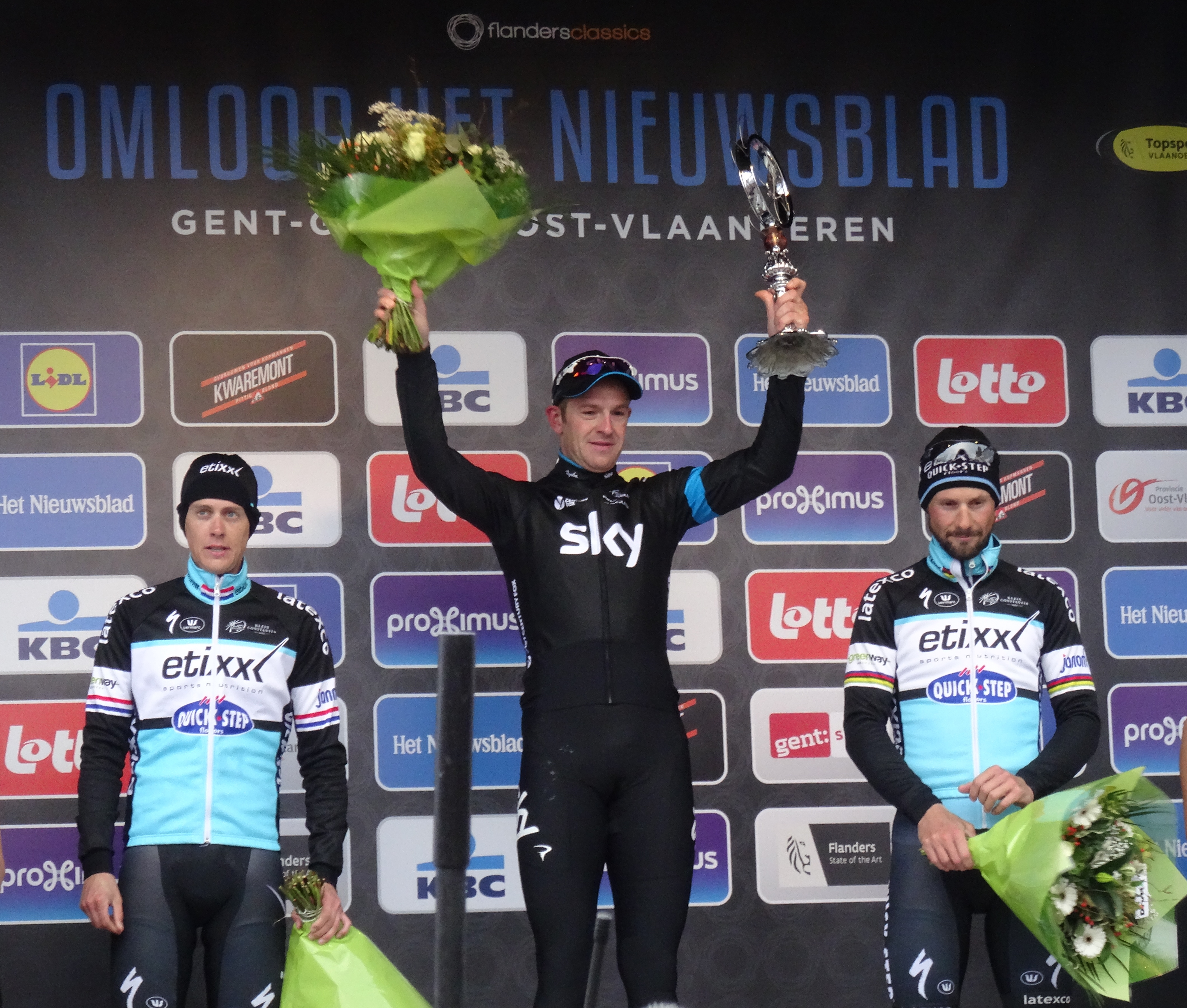 Reportage réalisé le samedi 28 février à l'occasion du départ et de l'arrivée du Circuit Het Nieuwsblad 2015 à Gand, Belgique.